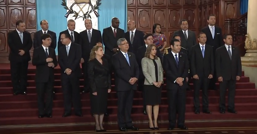 Consejo de Ministros 2016